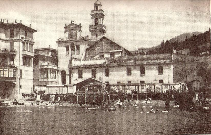 Il complesso monastico delle Clarisse nei primi anni del XX secolo, Rapallo, Liguria, Italia